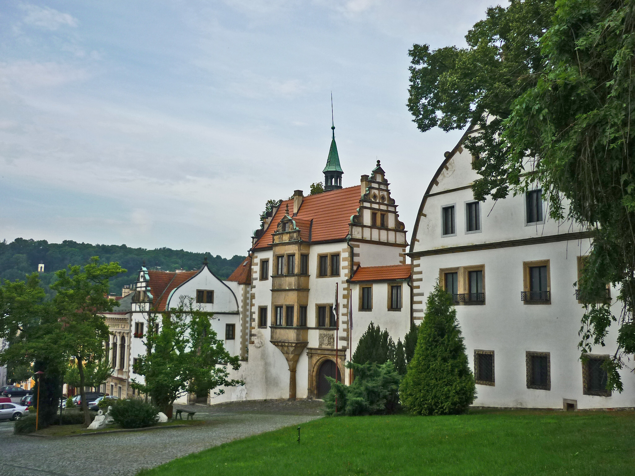 Unteres Schloss in Bensen (Benešov nad Ploučnicí) bestehend aus Johann- bzw. Anton-Schloss, Wolf-Schloss und Czernín-Morzin-Schloss (von rechts nach links)